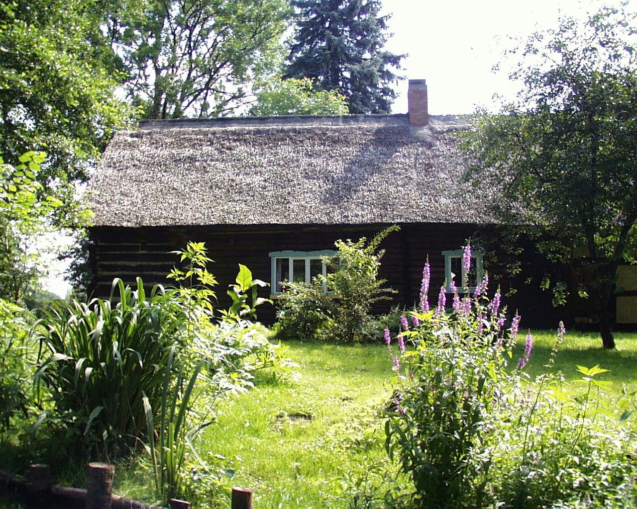 Ein schönes altes Haus bei Burg im Spreewald